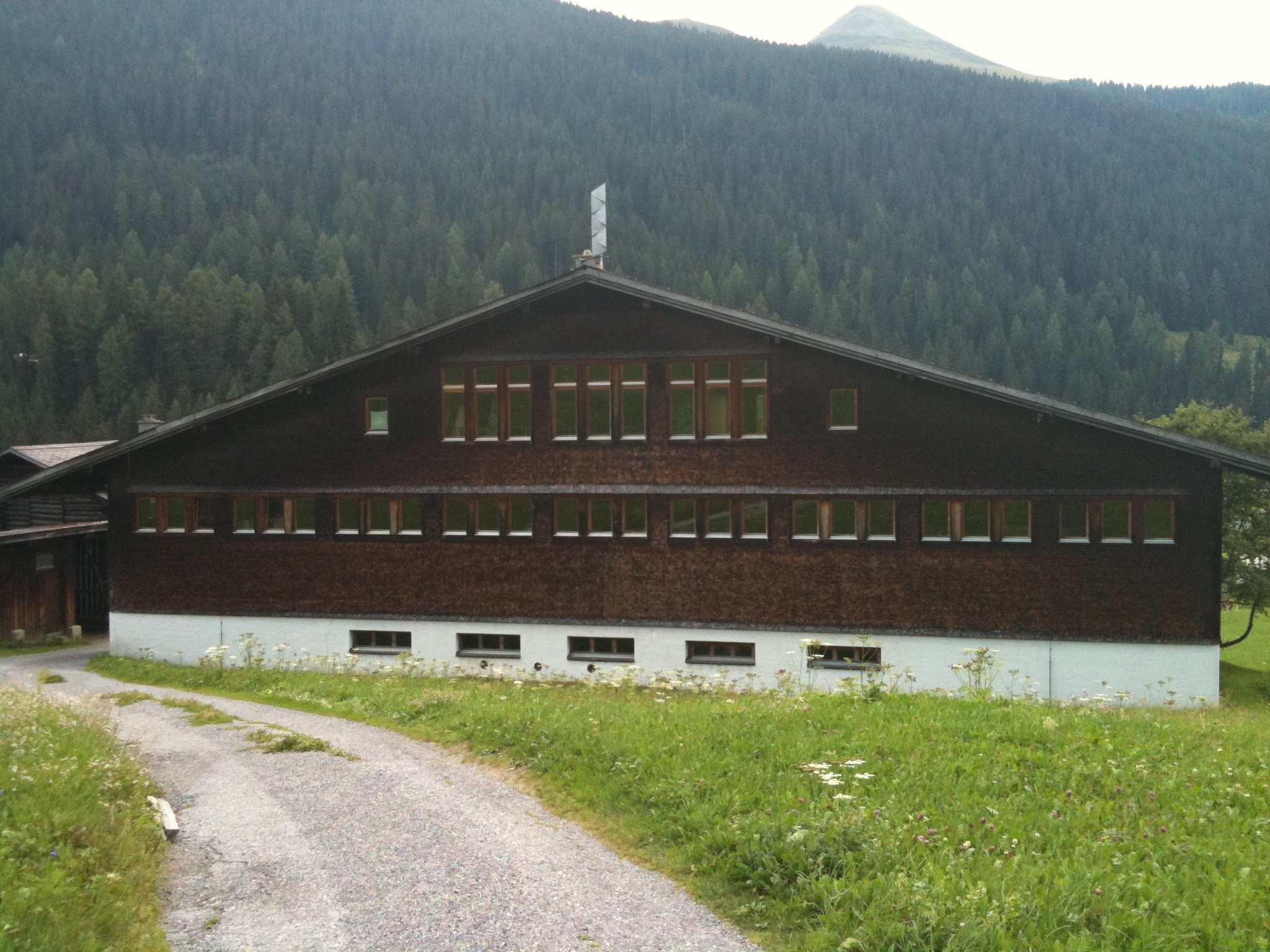 Schulhaus in Davos Frauenkirch (Kanton Graubünden), Rückseite. Realisiert 1936. Architekt: Rudolf Gaberel.